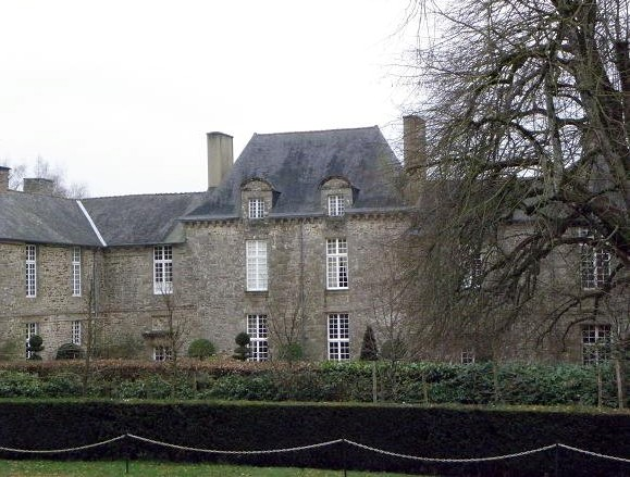 Château de La Ballue à Bazouges-la-Pérouse (35).